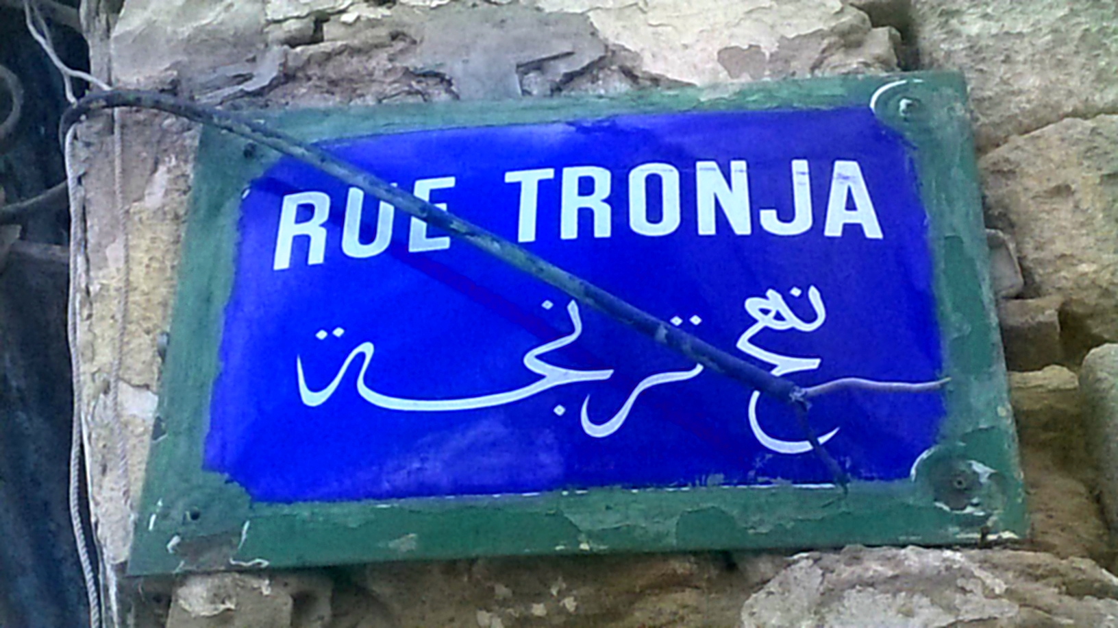 Rue Tronja, Bab Souika, Tunis نهج ترنجة، باب سويقة ،تونس العاصمة